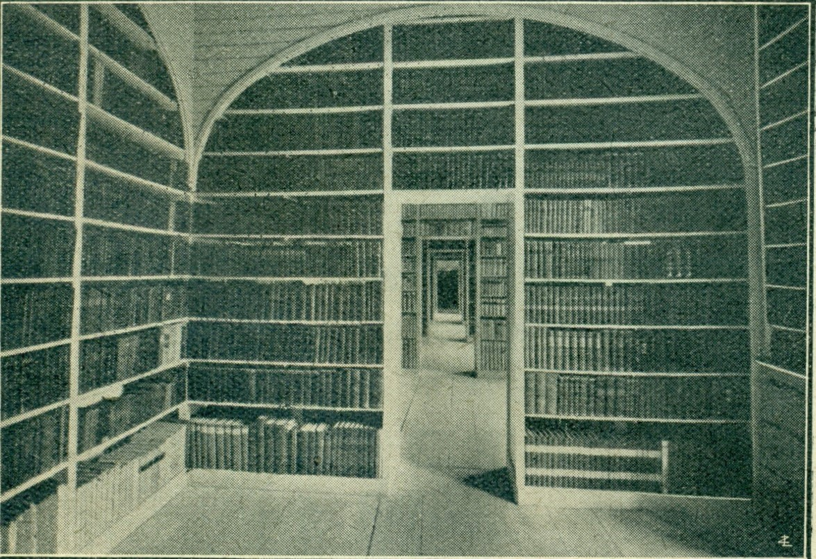 Biblioteca civica di Rovereto negli anni 20 Palazzo Annona Foto originale anni 20 - biblioteca personale